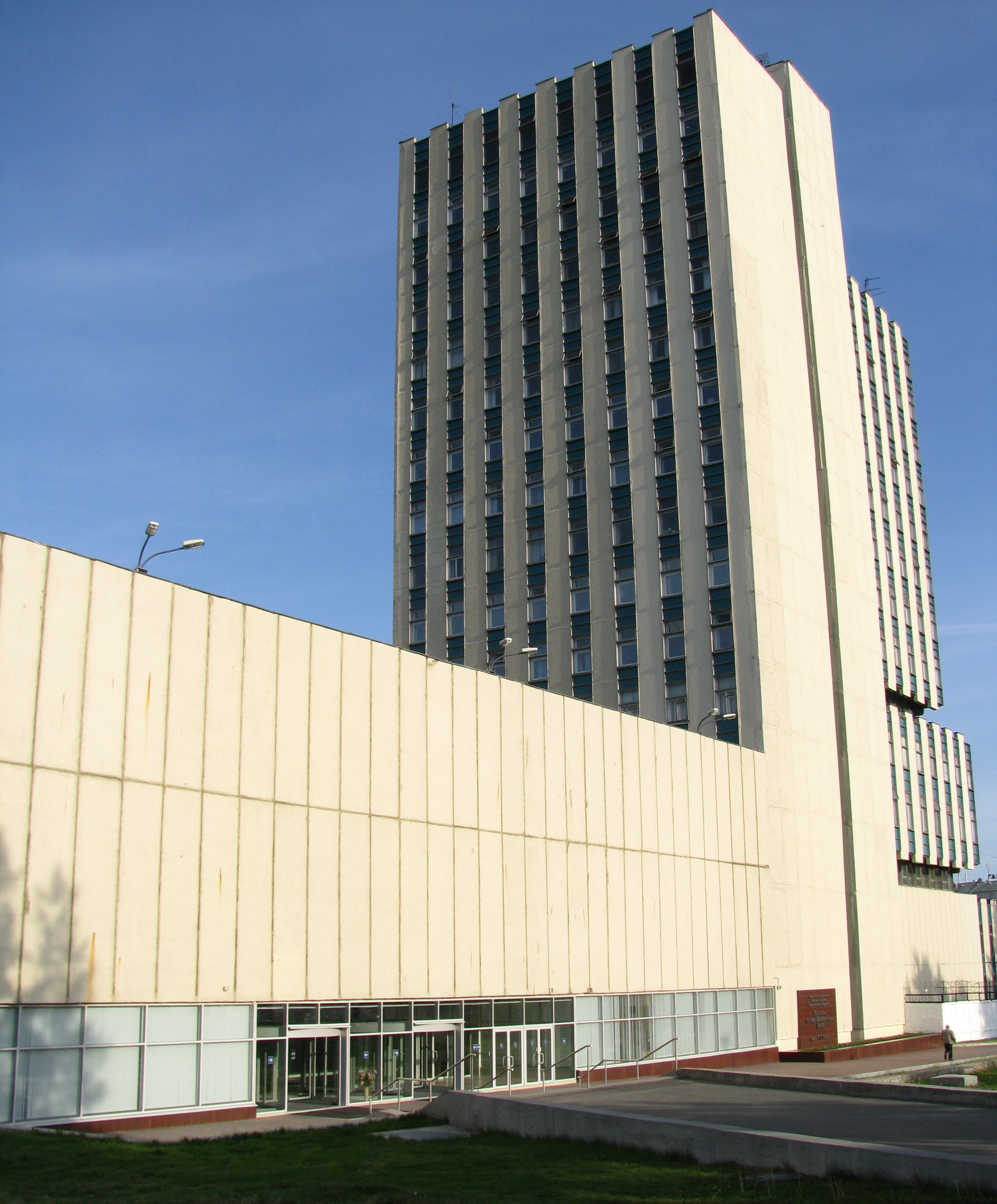 проходная Уральского Оптико-механического завода